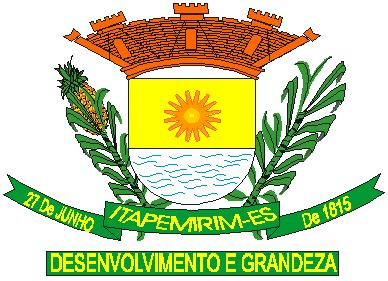 Brasão do Municipio de Itapemirim (ES), Brasil